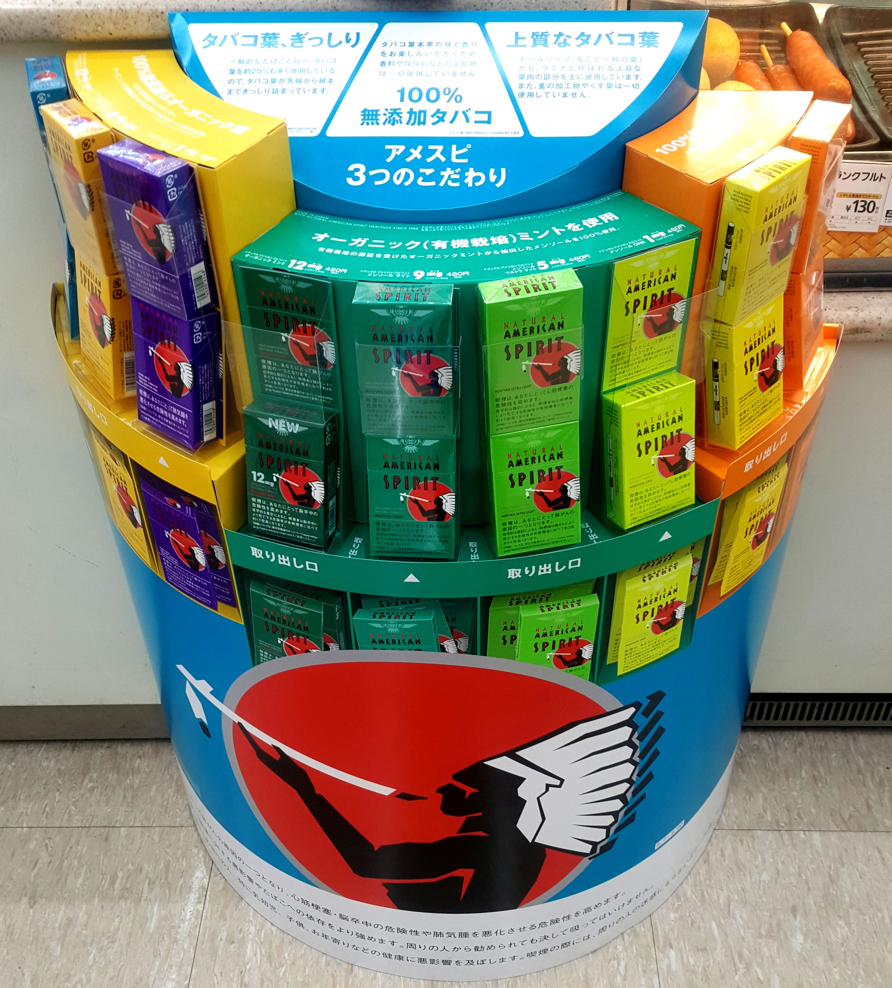 アメリカンスピリッツ販促広告（ミニストップ国分寺店）